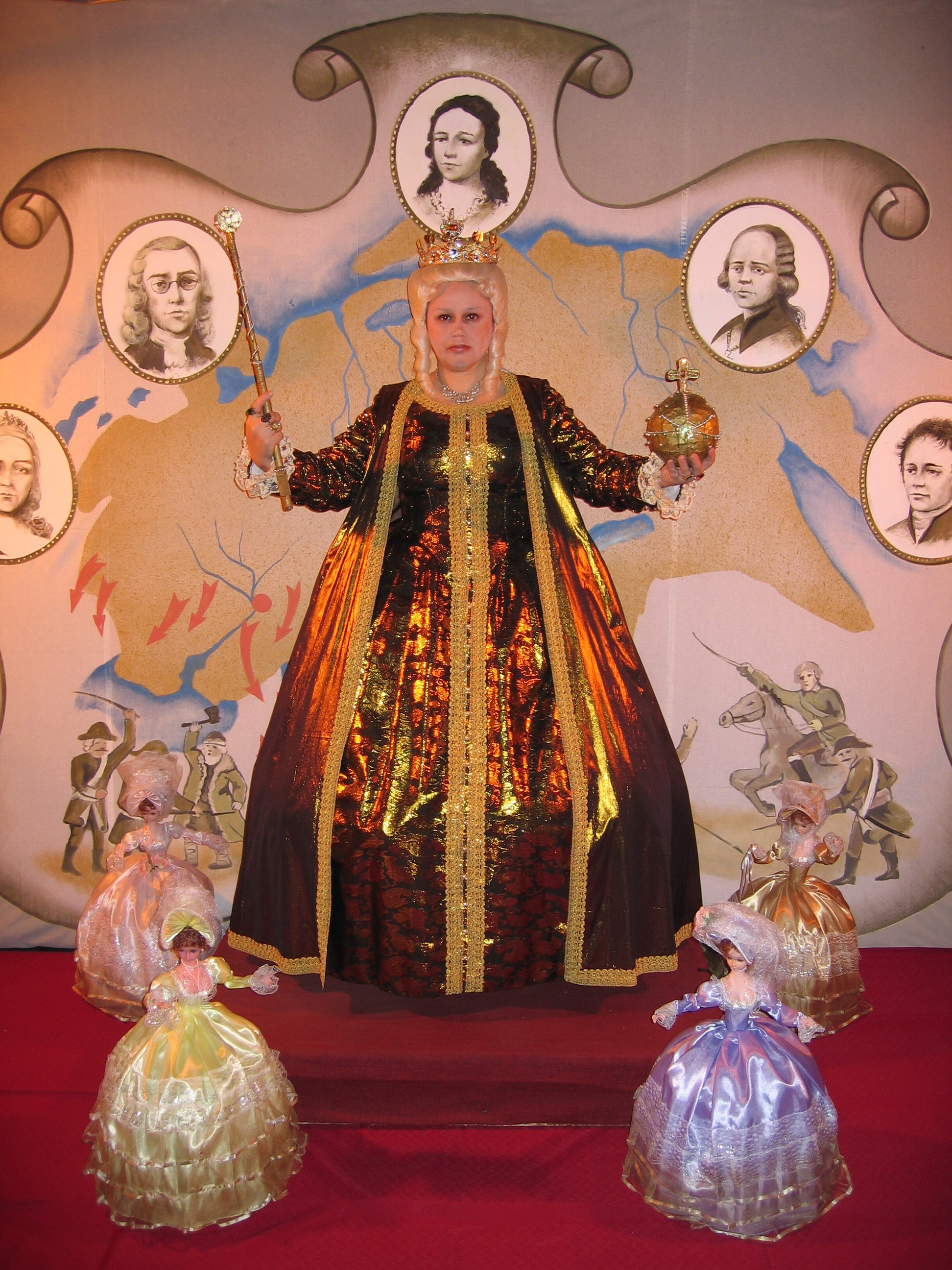 Татьяна Кудрявцева в роли Екатерины Великой из спектакля "Любовь и смерть. Мужчины Екатерины Великой", режиссёр-постановщик Егоров Геннадий Семёнович